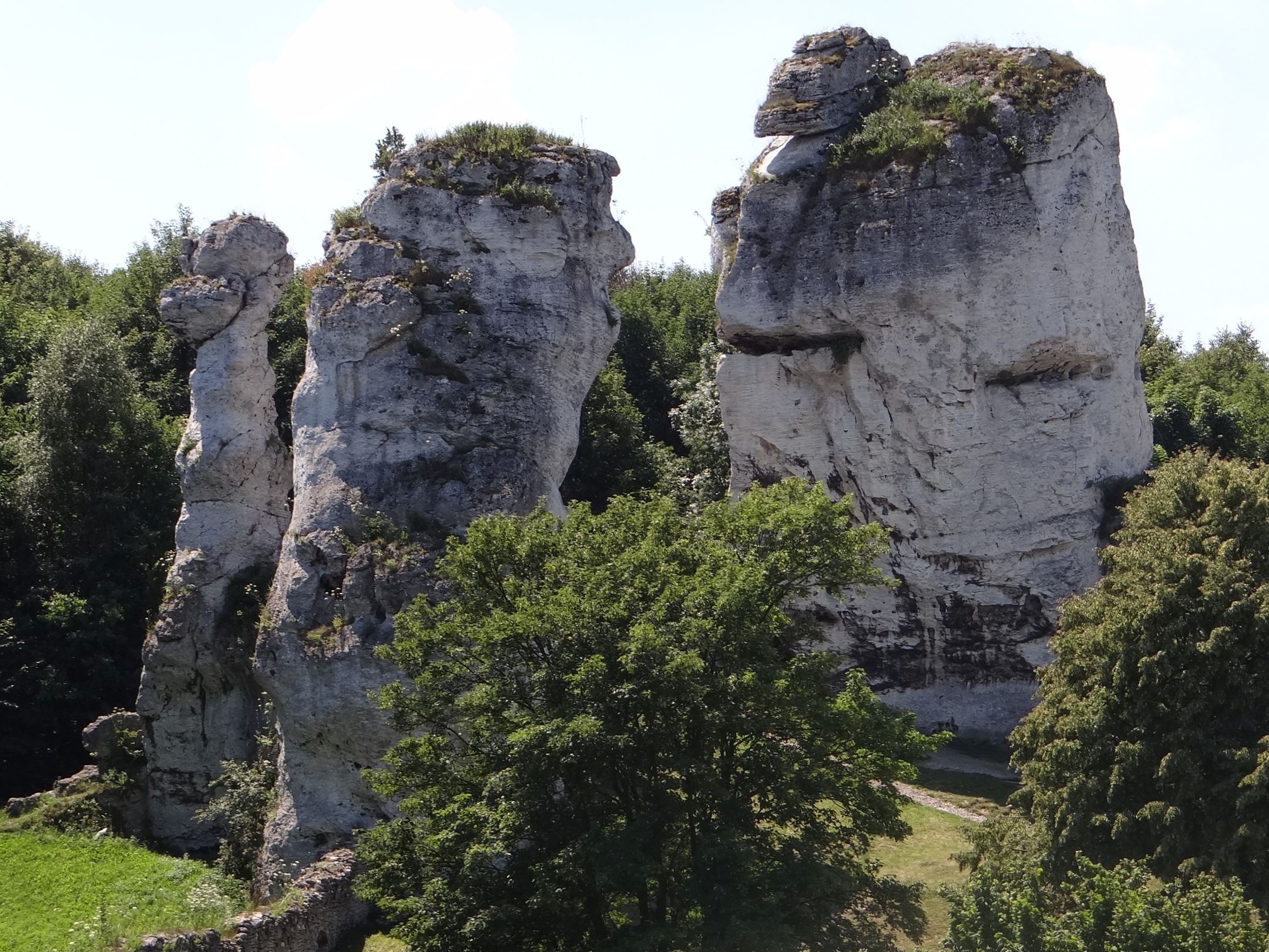 Skały Dwie Siostry i Niedźwiedź na Zamku Ogrodzieniec w miejscowości Podzmcze